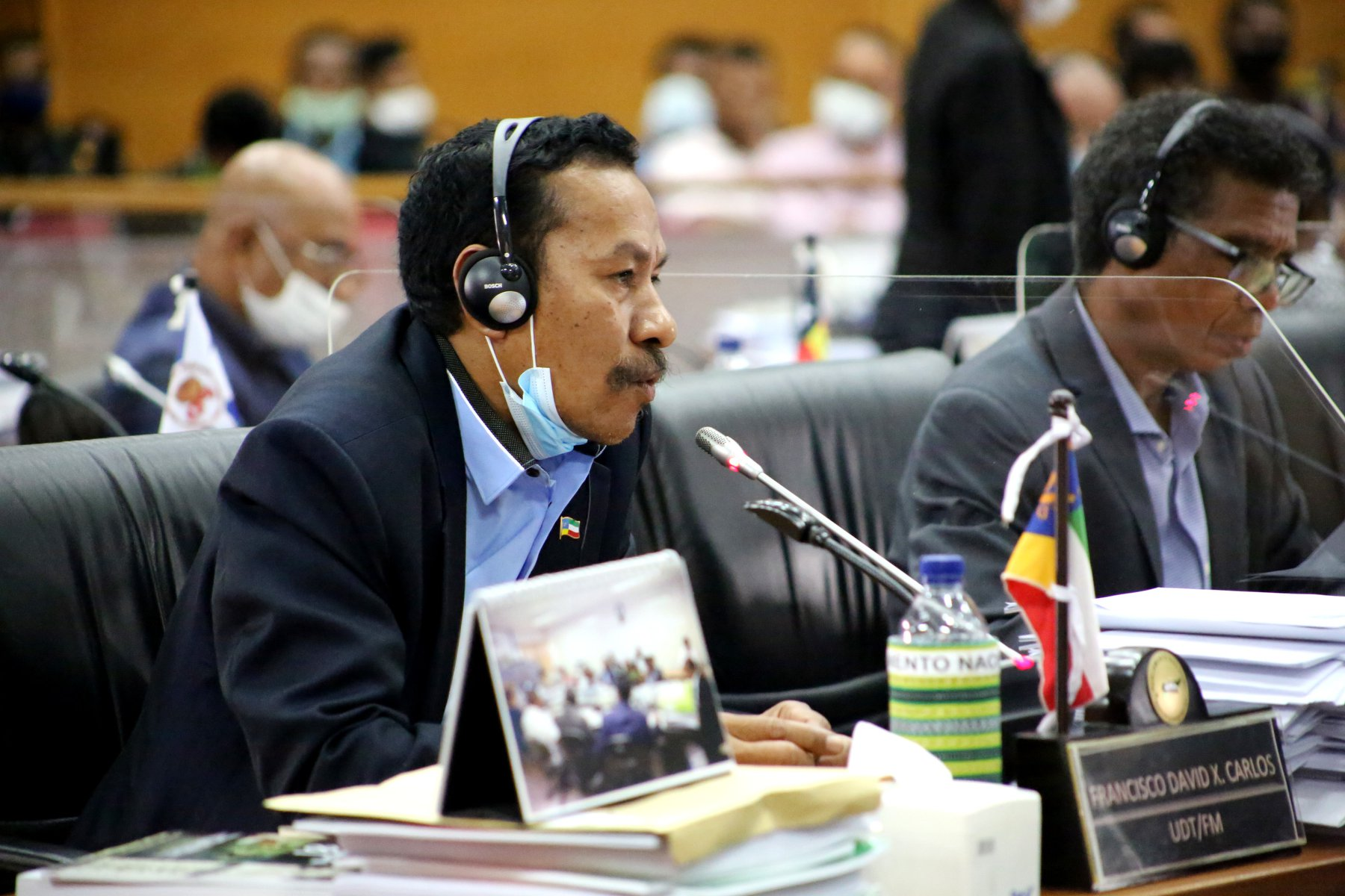 Francisco David Xavier Carlos in der Sitzung zur Verlängerung des Ausnahmezustandes im Nationalparlament Osttimors